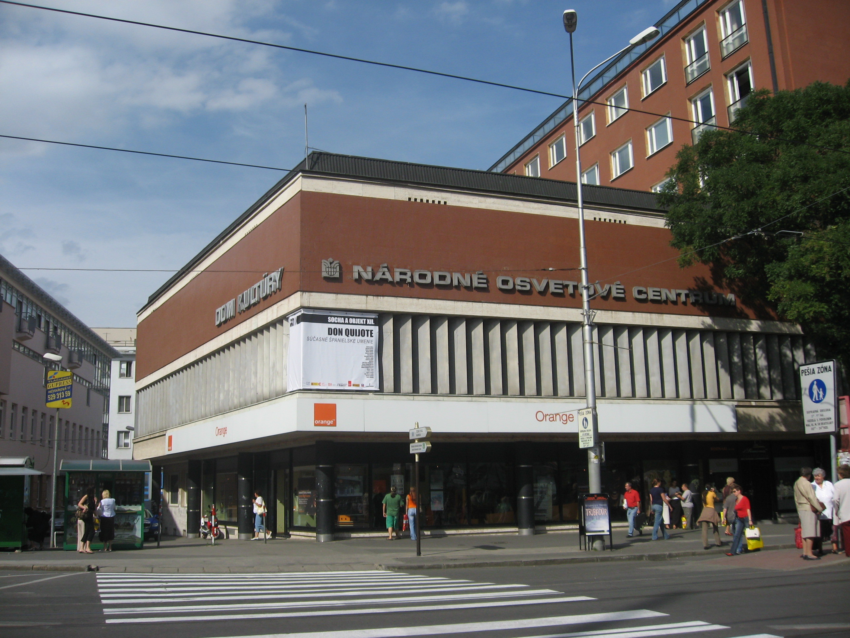 Bratislava, Národné osvetové centrum